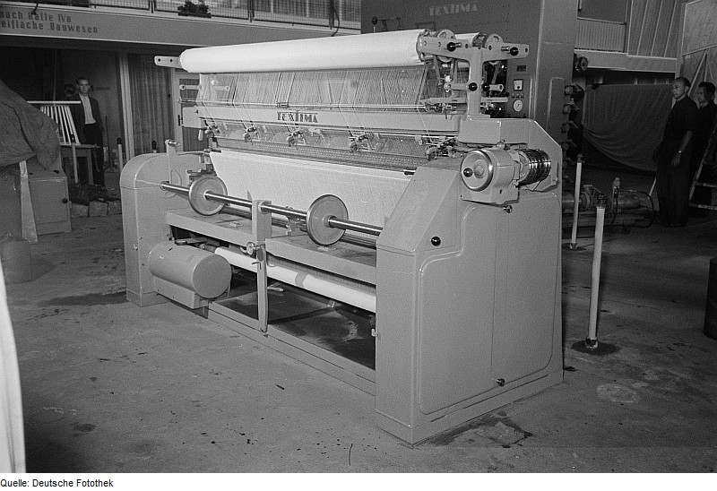 Original image description from the Deutsche Fotothek Textilindustriemaschine des VEB Kombinat Textima Karl-Marx-Stadt auf der Leipziger Herbstmesse 1954